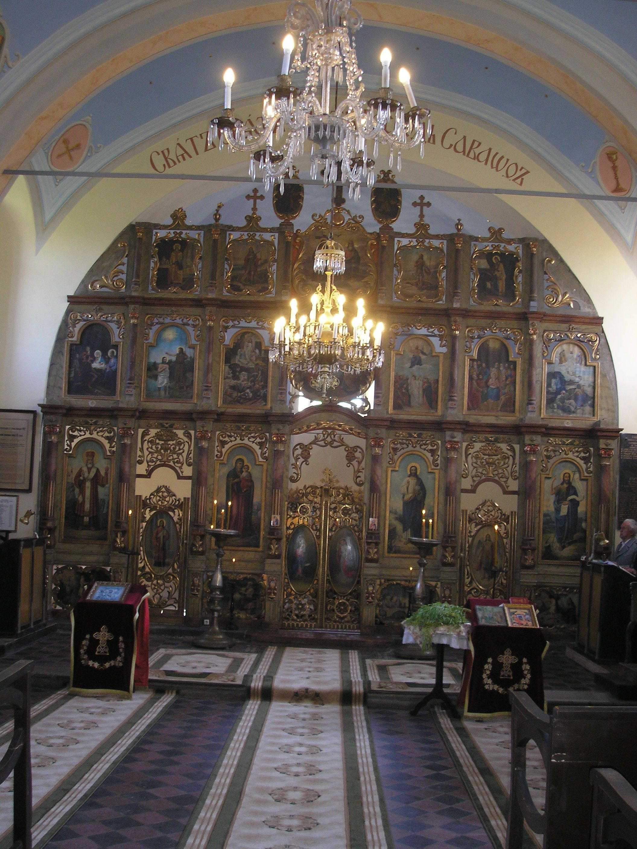 Kisboldogasszony szerb ortodox templom ikonosztázionja (Szeged-Szőreg, Magyarország)